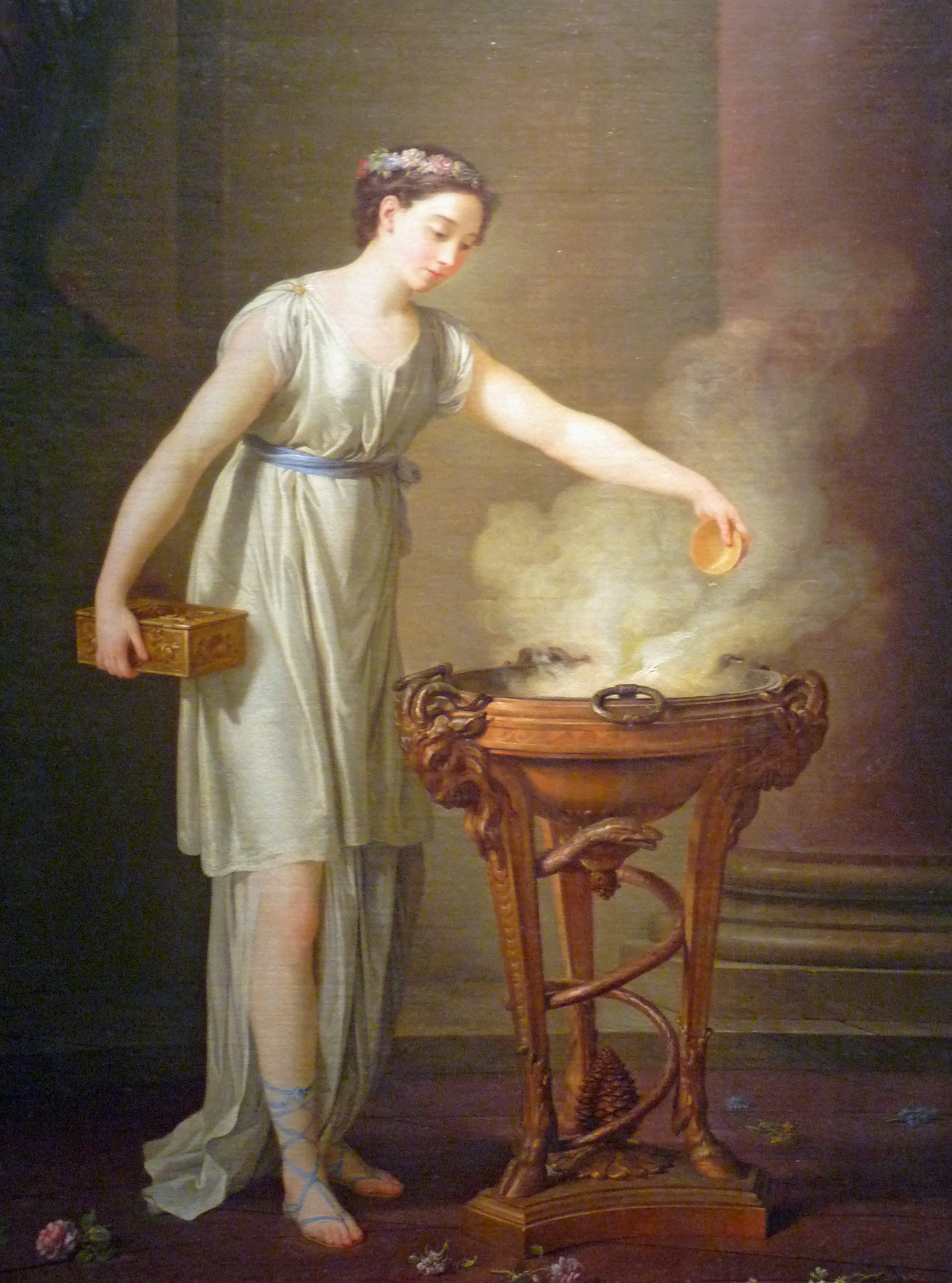 "Représente l'Hiver personnifié par une prêtresse qui brûle de l'encens sur un trépied".